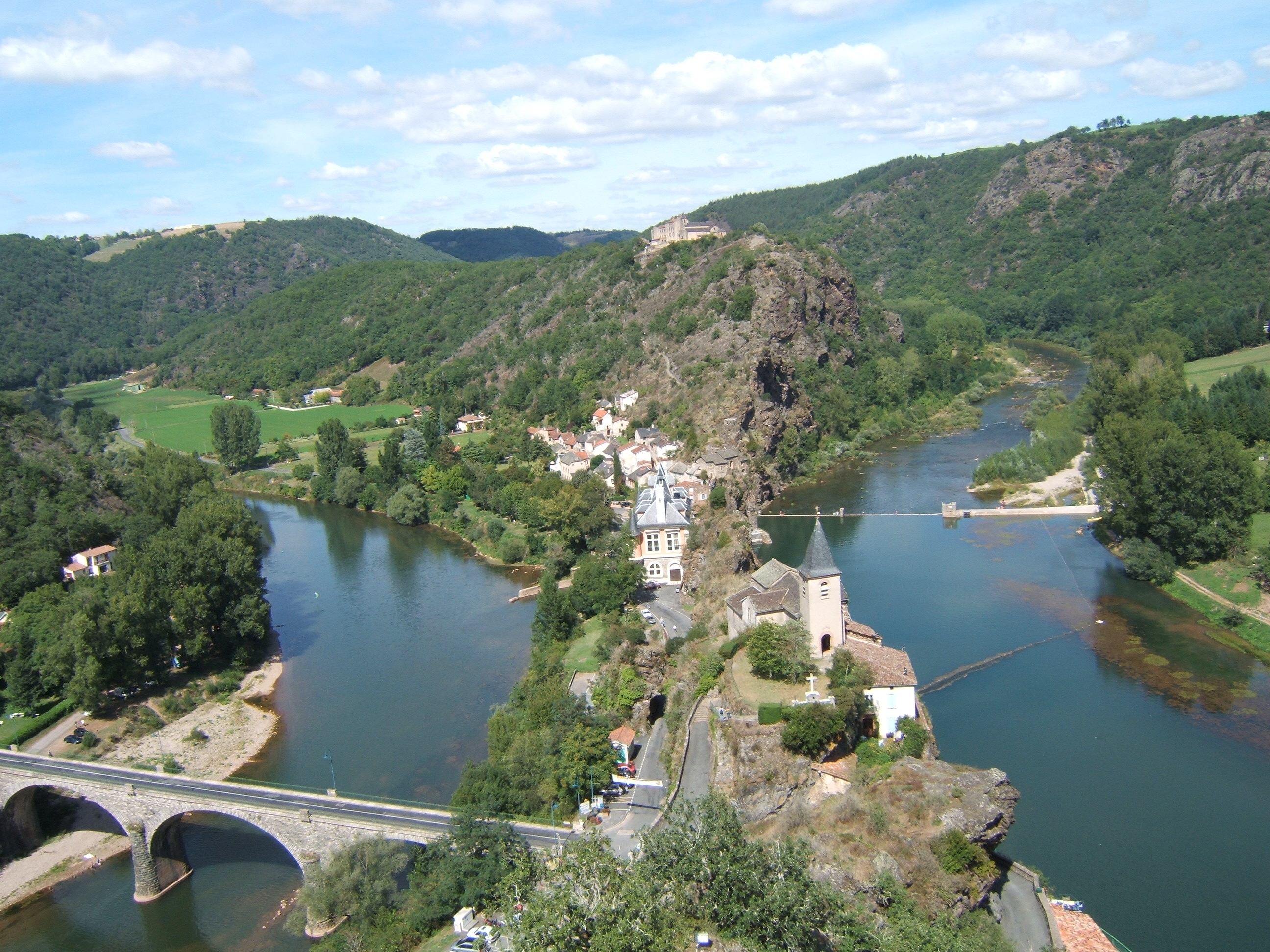 Village d'Ambialet